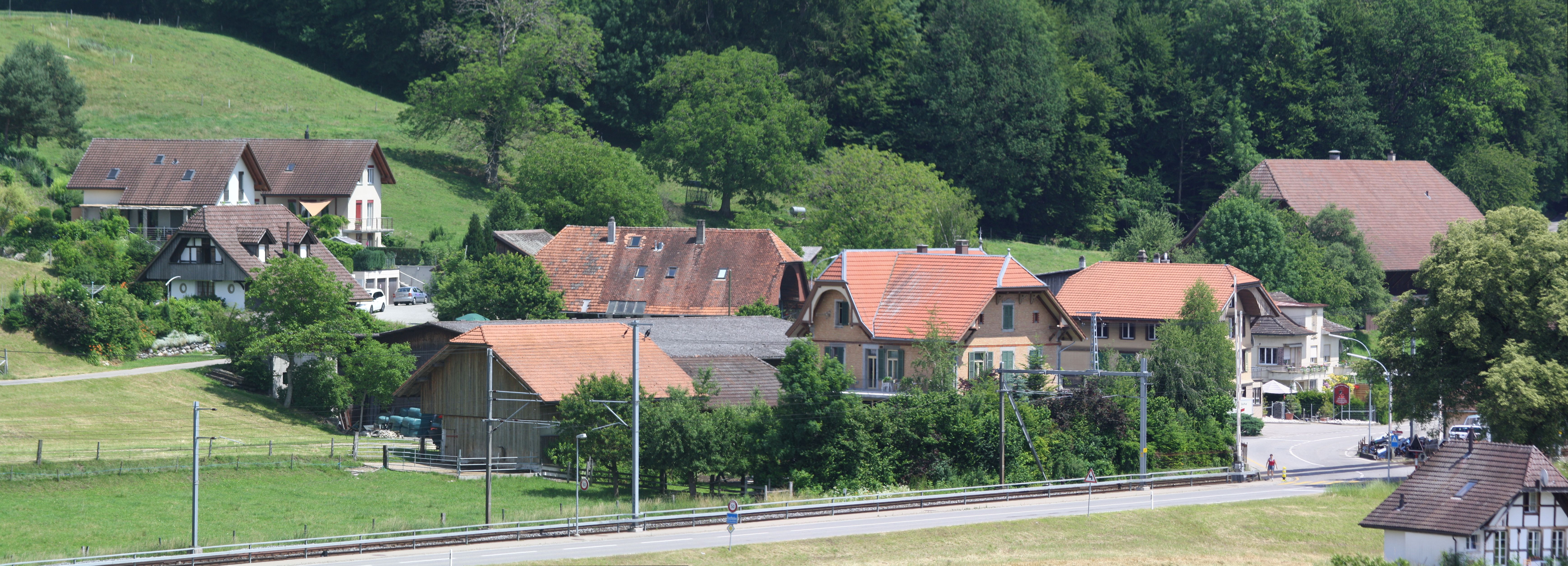 Panorama: Blick bei Grossaffoltern-Kosthofen